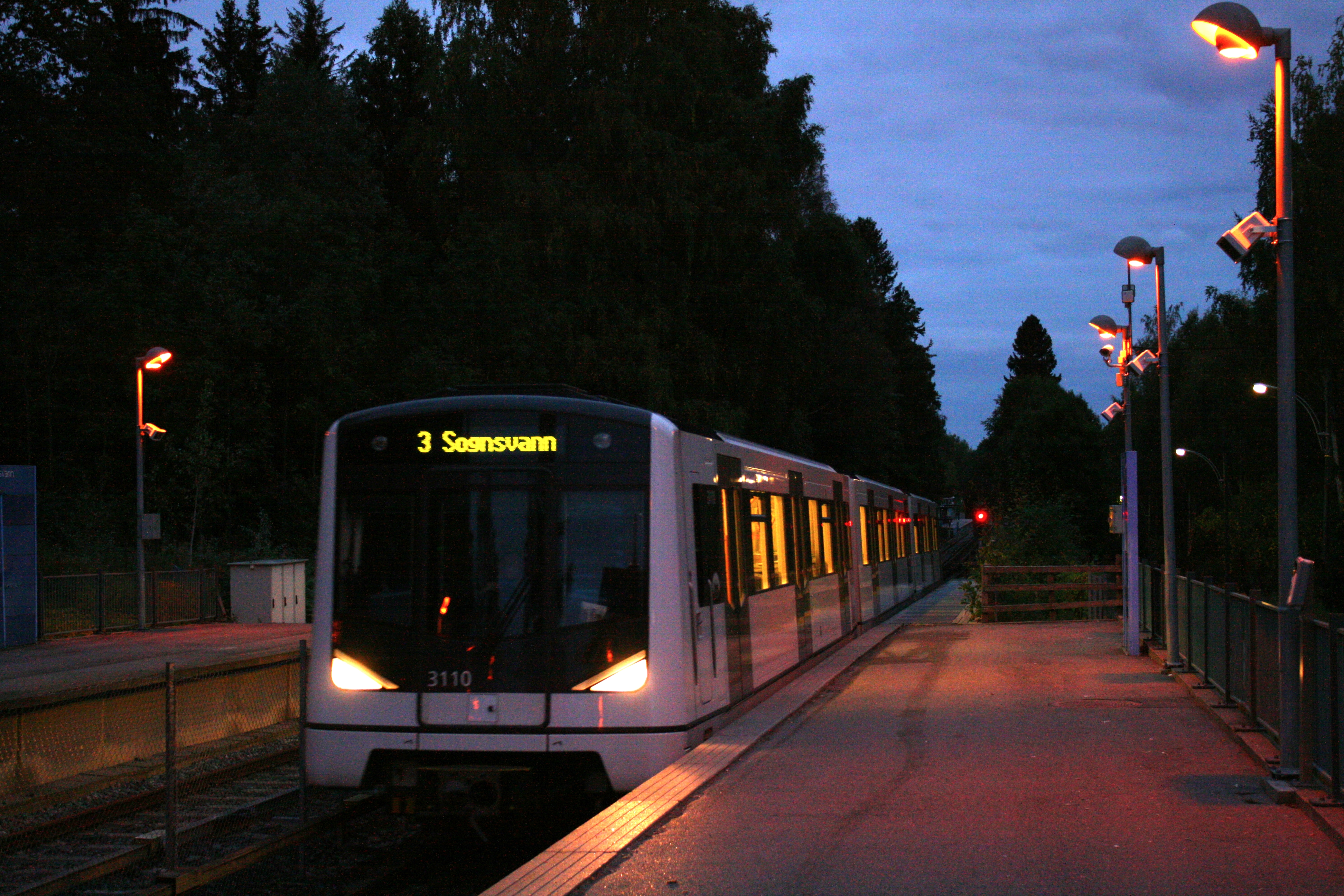 MX3000 på Sognsvann stasjon september 2008